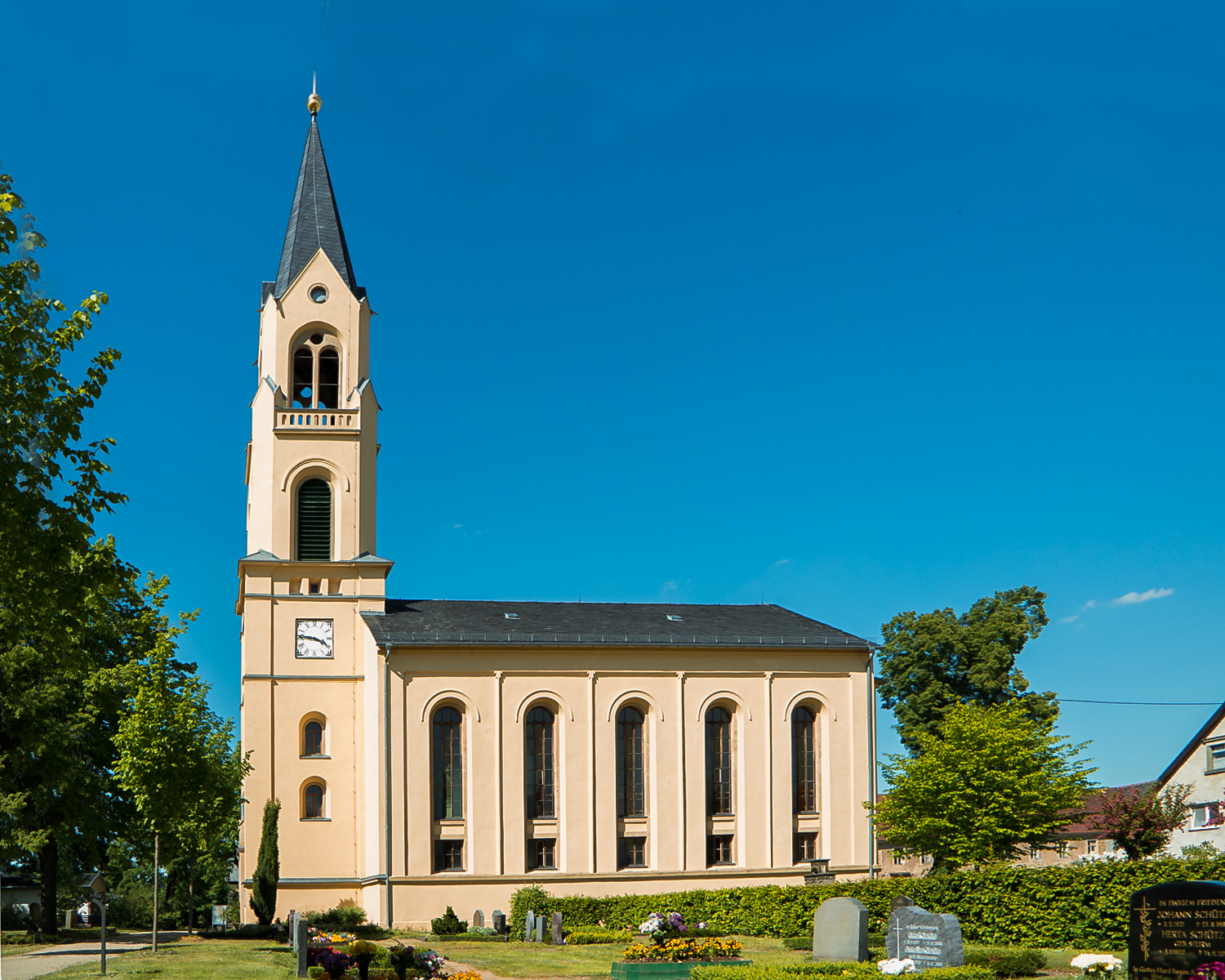 Kirche Wildenhain